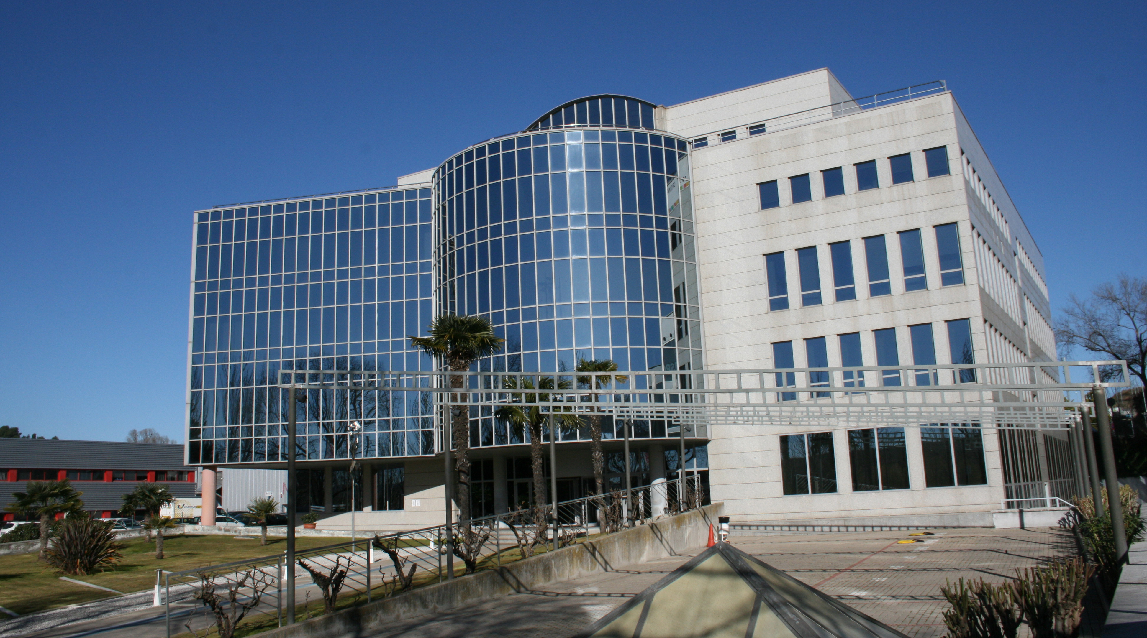 Fazana edifici Horizon